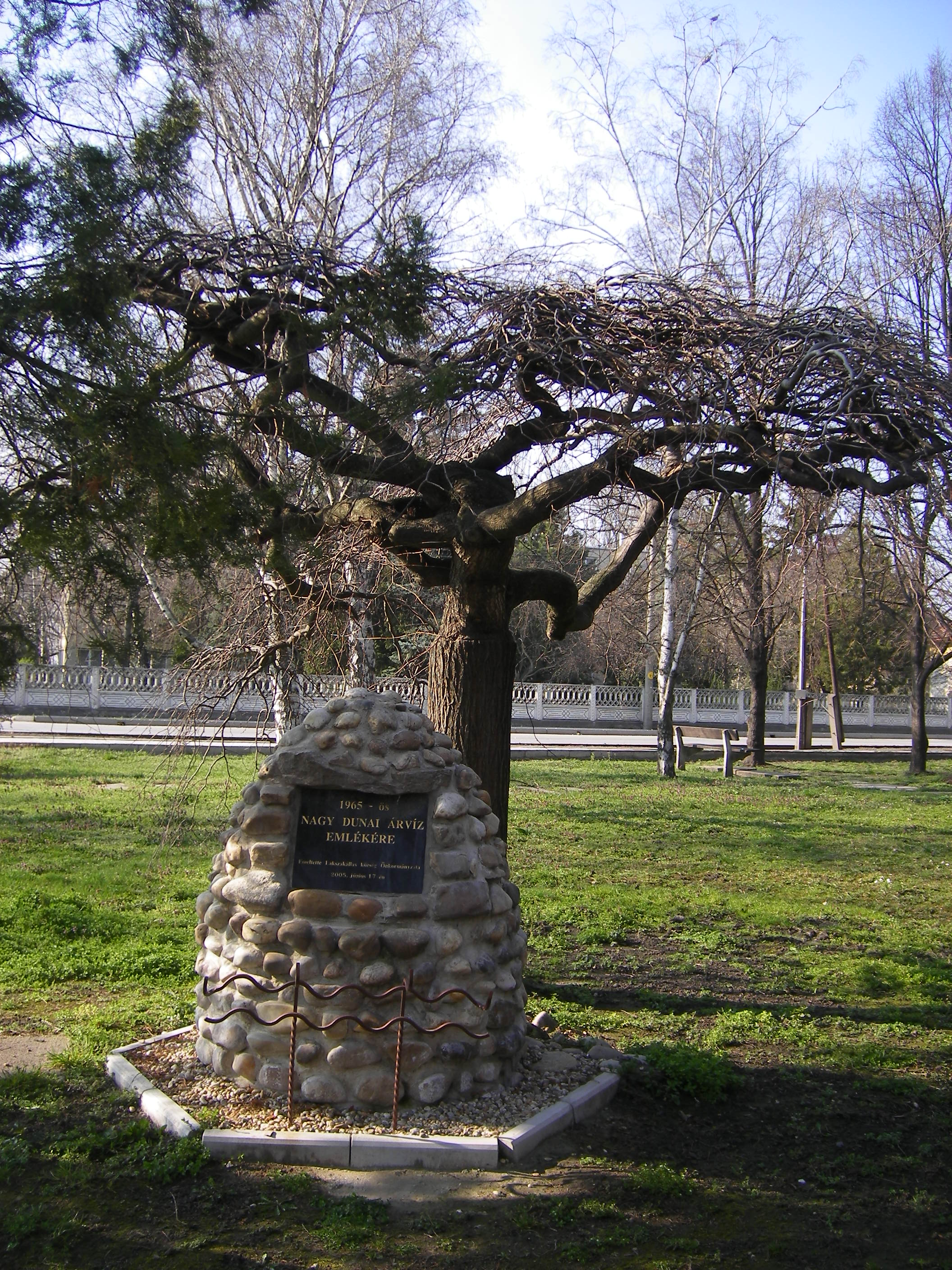 Lakszakállas - az 1965-ös árvíz emlékműve